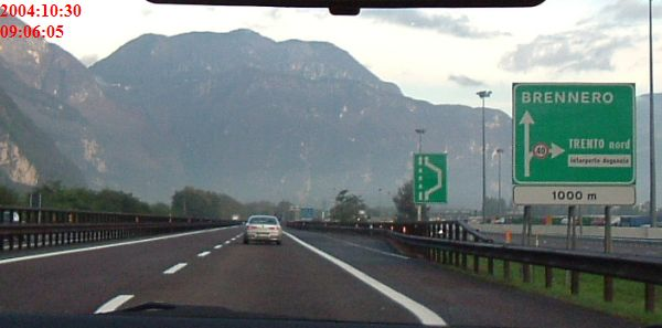 Route européenne 45 au niveau de la sortie Trento nord en Italie